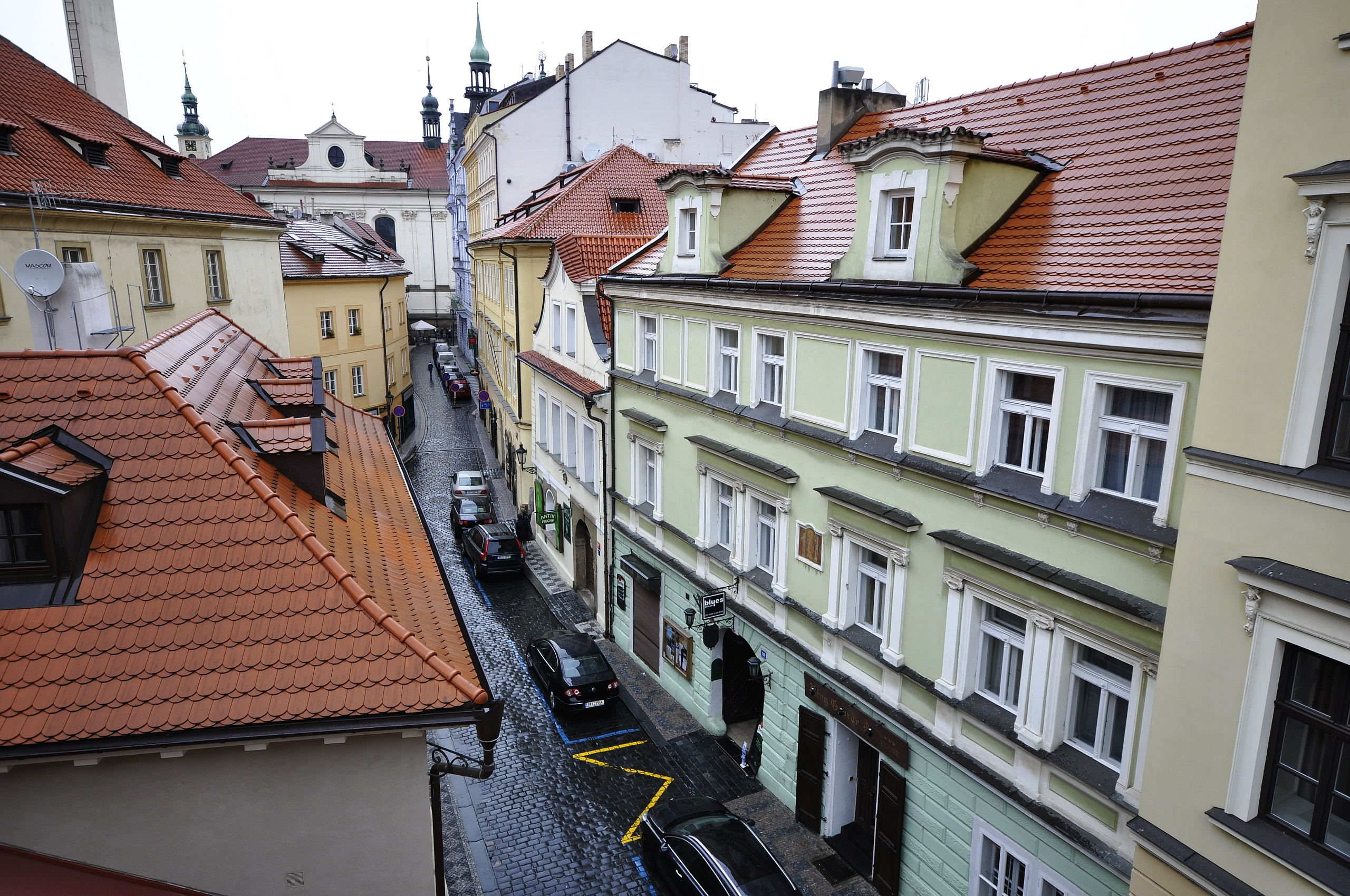 Pohled k severu ze střechy domu U Voříkovských, Liliová 5.